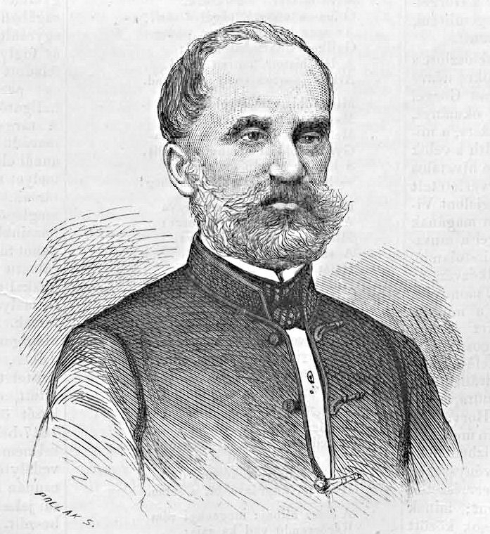 Vukovics Sebő (1811–1872) politikus, miniszter. (Vasárnapi Ujság, 1868. augusztus 16.)